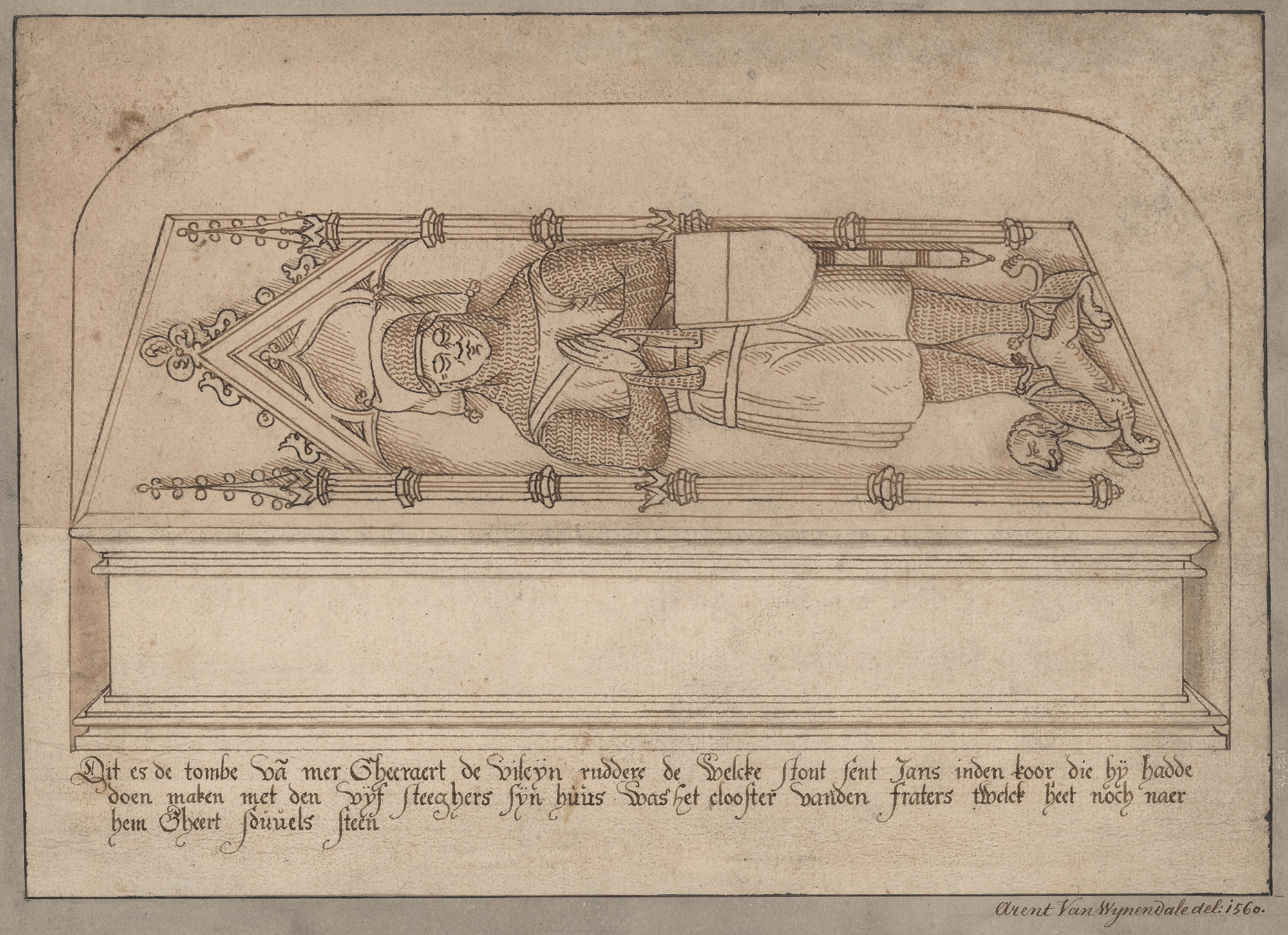 Grafmonument van Gerard van Gent (1400/10-1466/78), bijgenaamd de Duivel, in de Sint-Janskerk (nu Sint-Baafskathedraal). Pentekening door de Gentse stadsschilder Arent van Wijnendale (+1592), collectie Archief Gent (inv.nr. IC_AG_AVW_34).